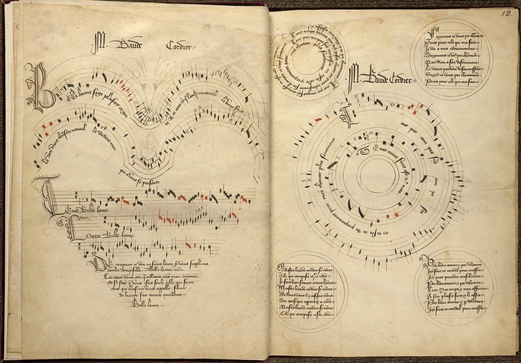 Codex Chantilly